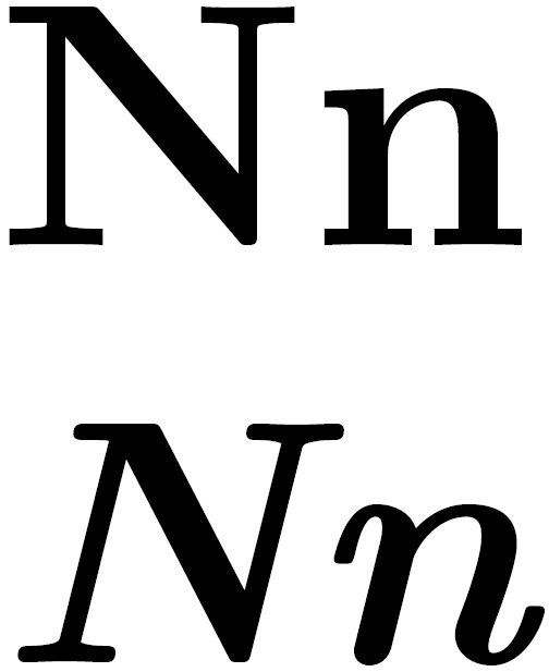 Latin letter N